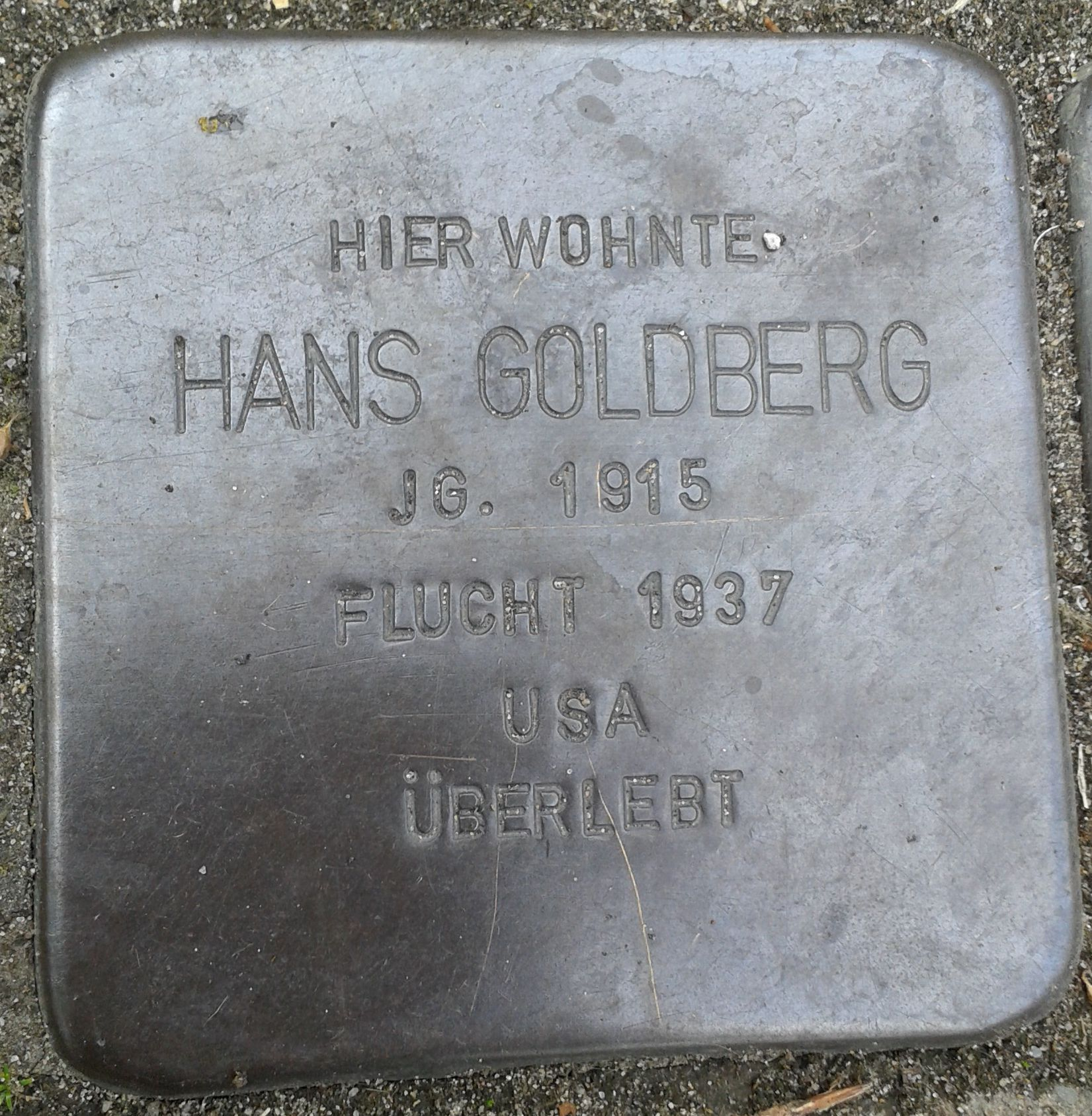 Stolperstein Datteln Carl-Gastreich-Straße 5 Hans Goldberg